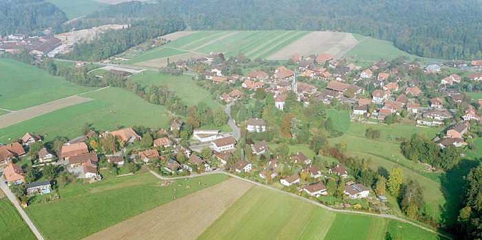 Rapperswil BE aus dem Helikopter.